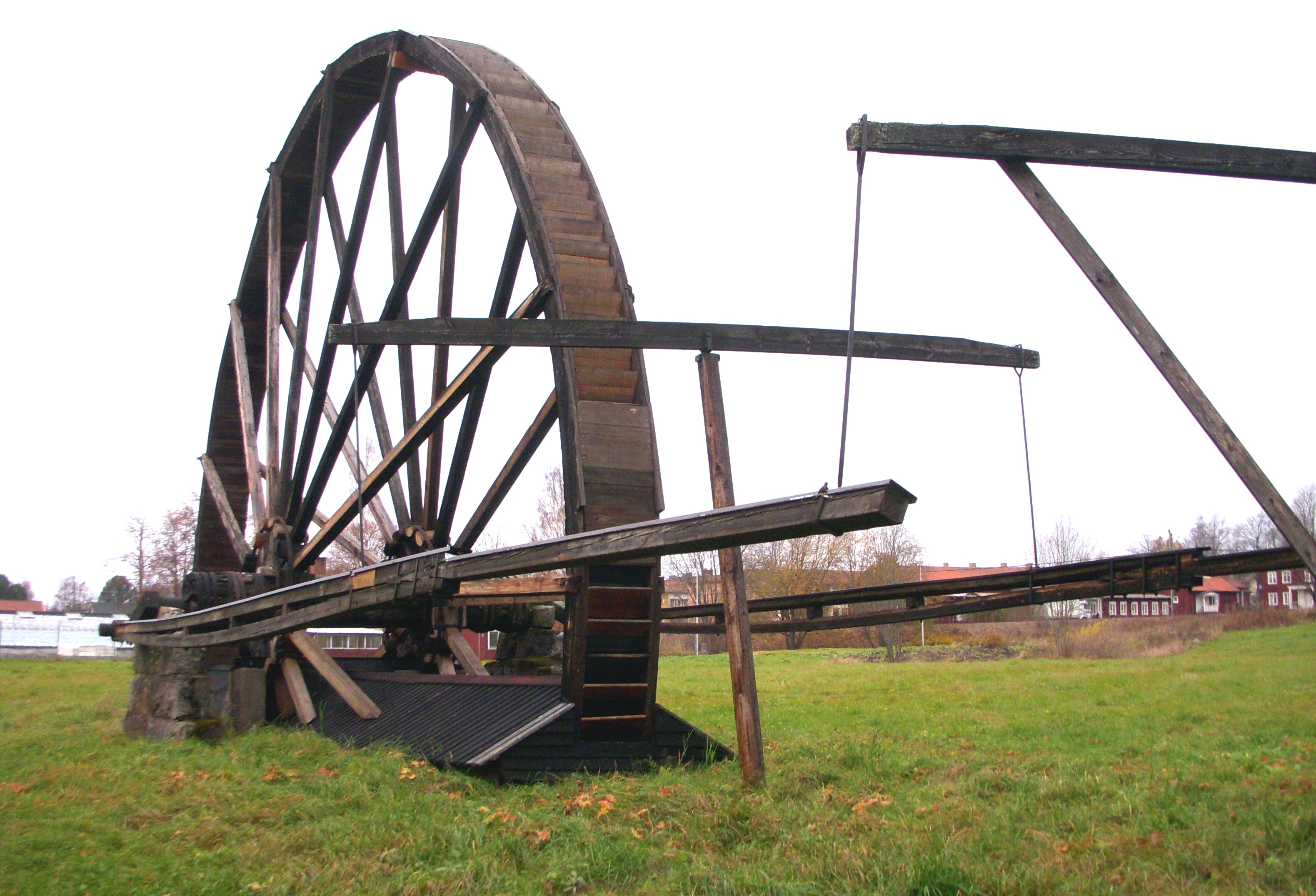 Ludvika Gammelgård, Östanberghjulet